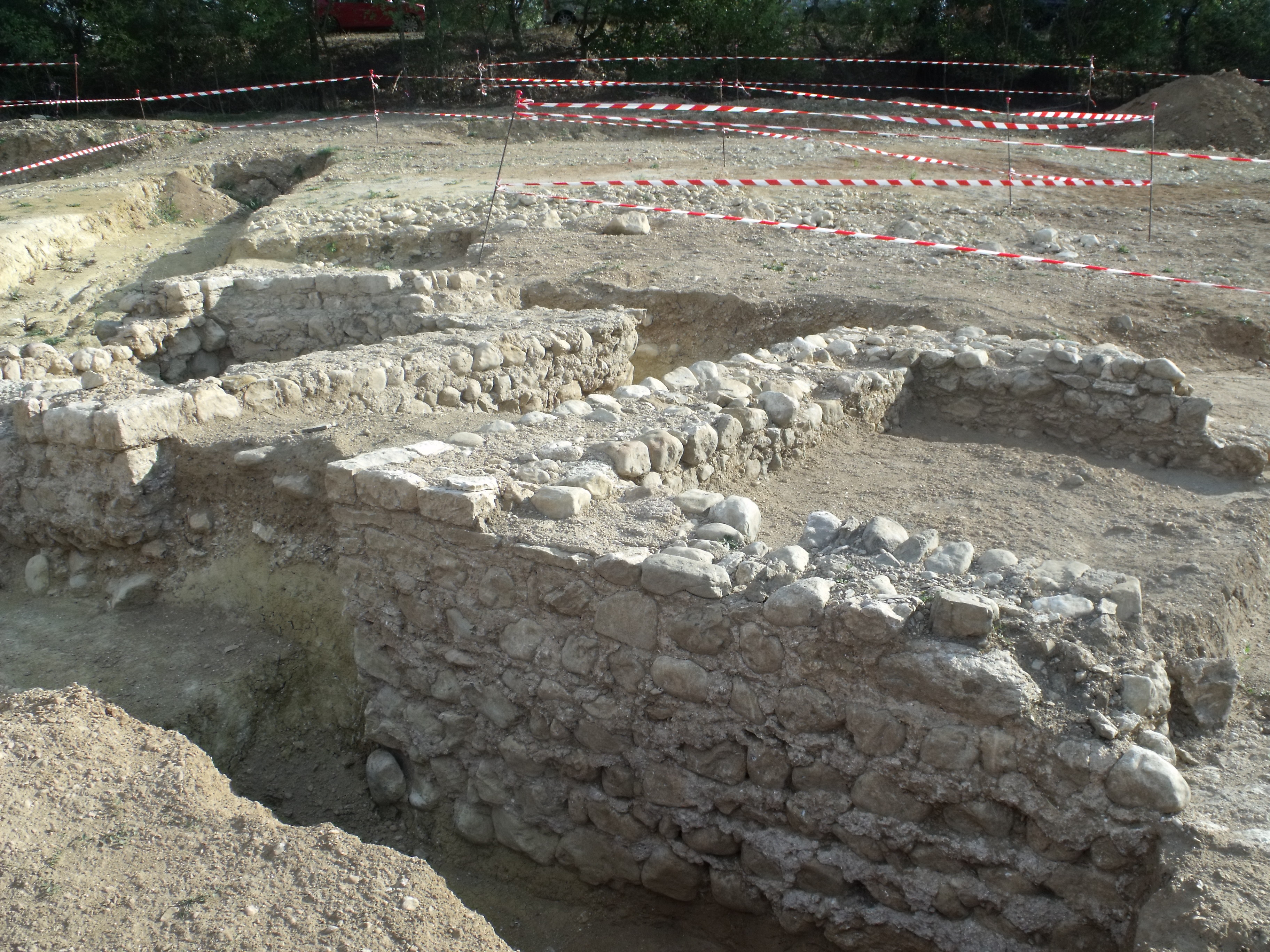 Vue des bâtiments cultuels du site de la Grassie (automne 2010). Aix-en-Provence.